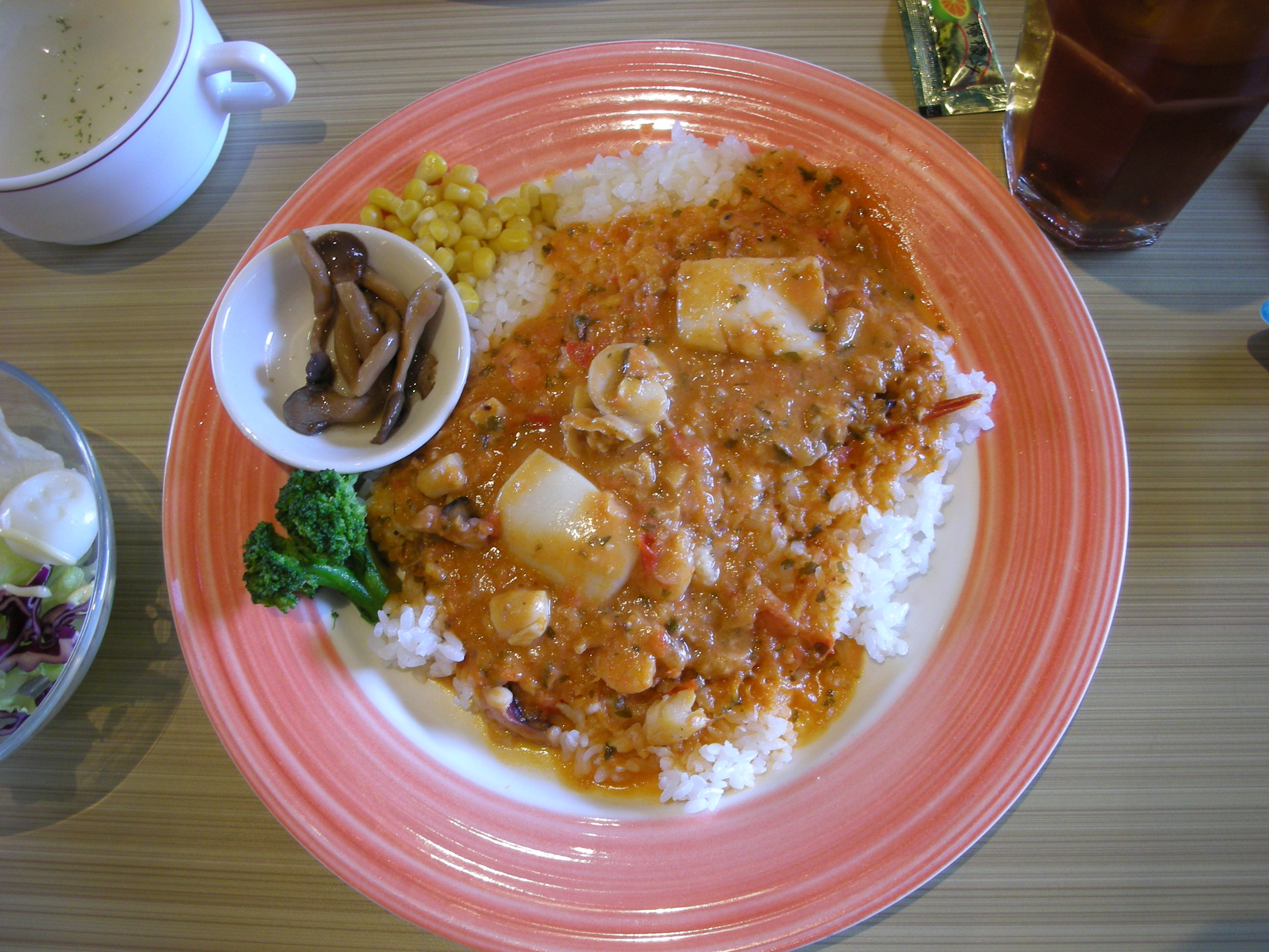 臺灣大學